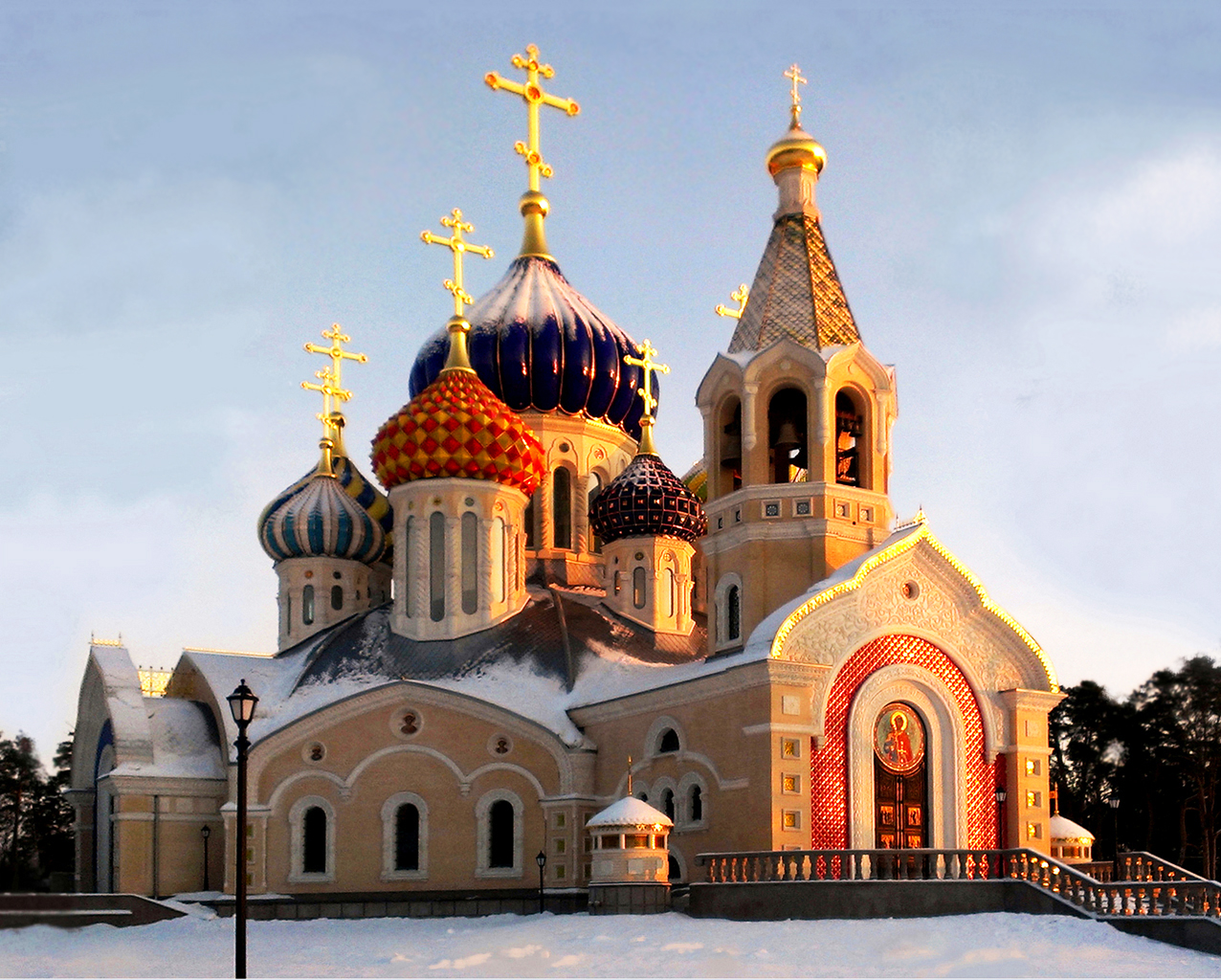 Церковь Святого Игоря Черниговского в Ново-Переделкино, архитектор А. И. Шипков